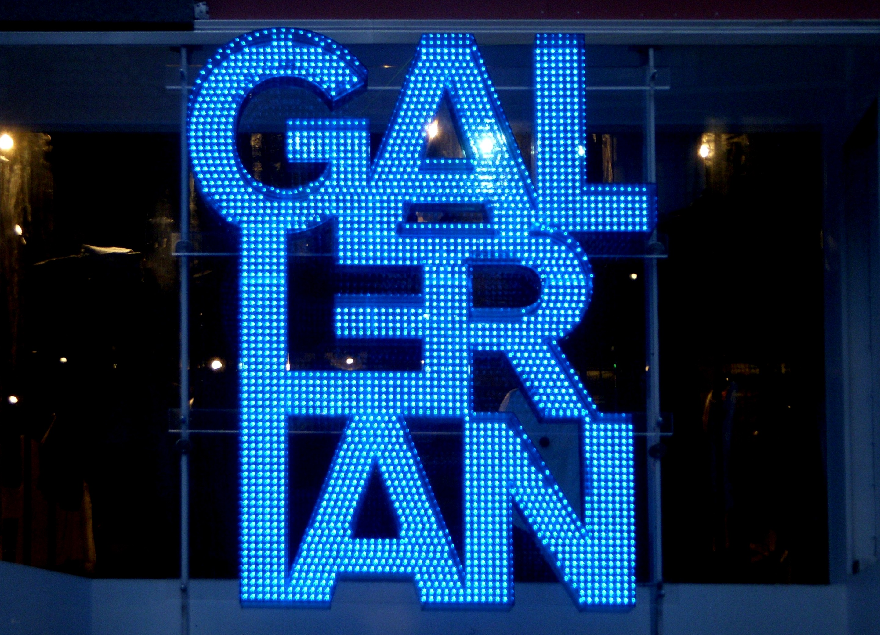 "Gallerian" skylt (från Jakobsgatan)